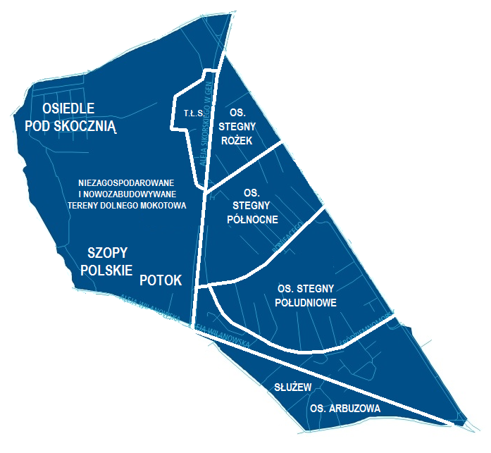 Osiedla i obszary składające się na rejon MSI Stegny